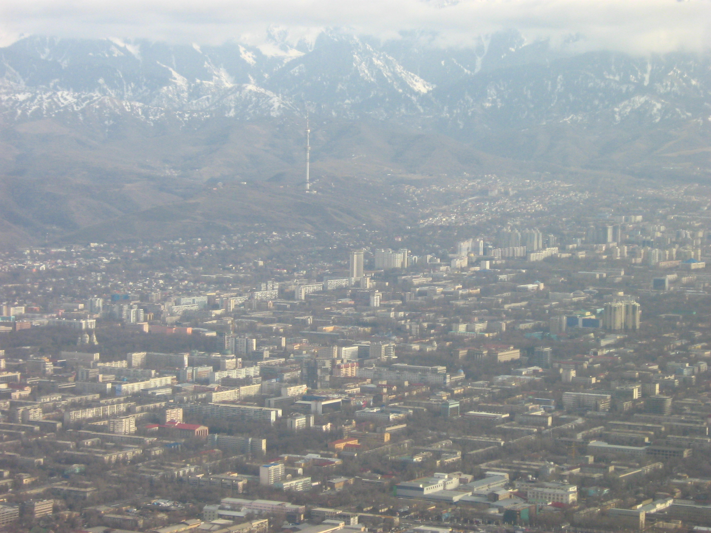 Вид Алма-Аты с высоты птичьего полёта